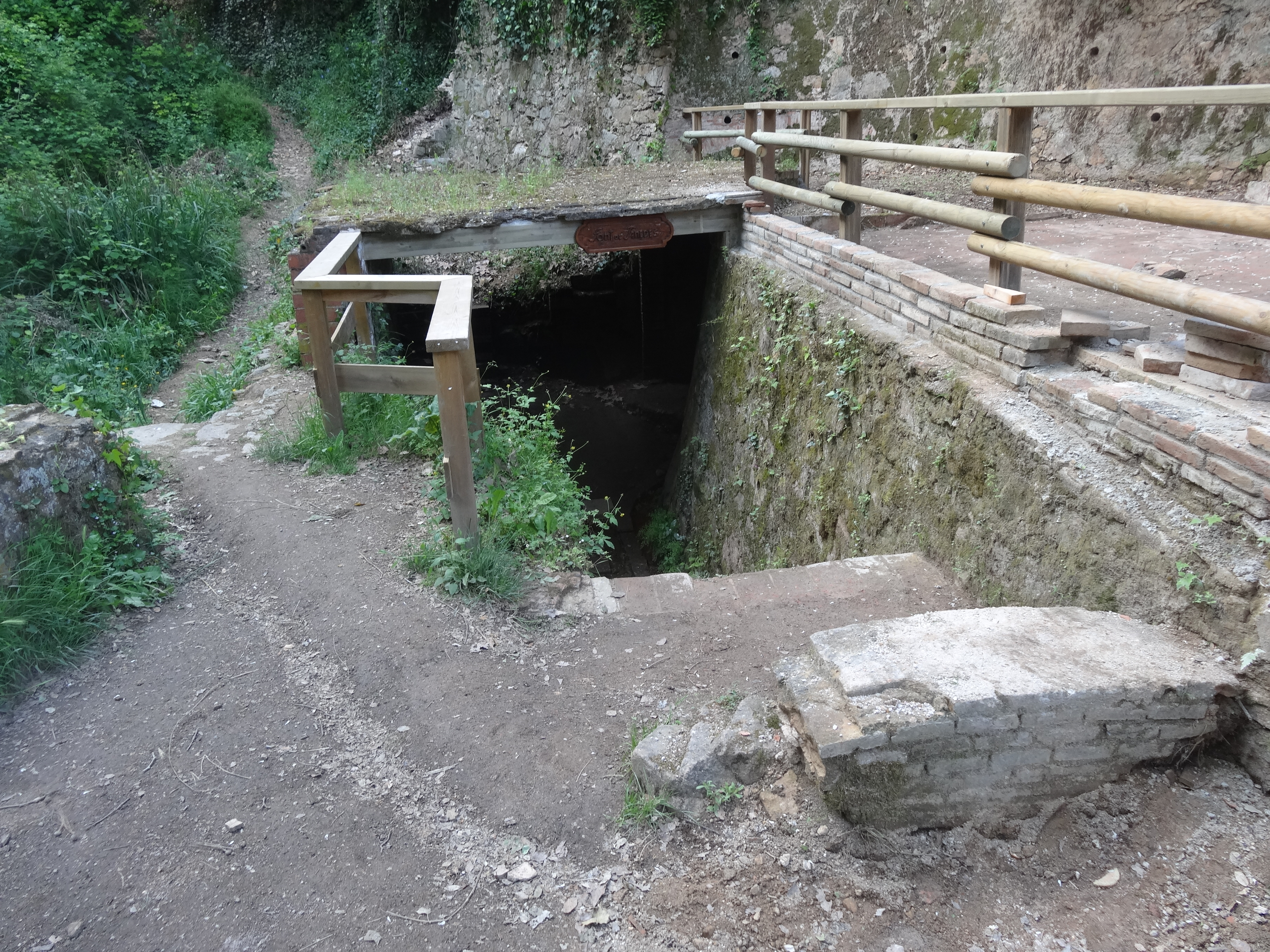 Font de Penedes o Font de Panedes (maig 2013)